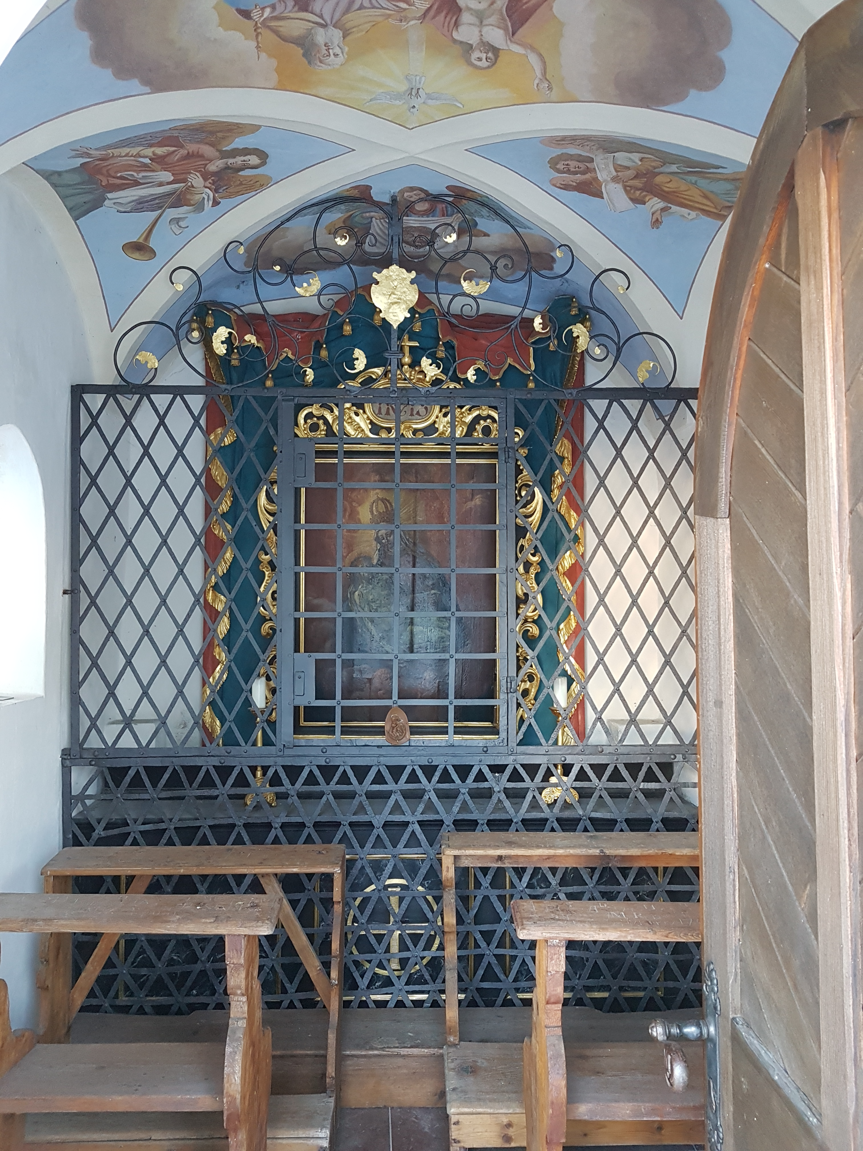 Kitzbühel, Gröbenbachkapelle an der Burgstallstrasse im Nordwesten der Stadt. This media shows the remarkable cultural object in the Austrian state of Tyrol listed by the Tyrolean Art Cadastre with the ID 9966. (on tirisMaps, on tirisdienste.at, pdf, more images on Commons)